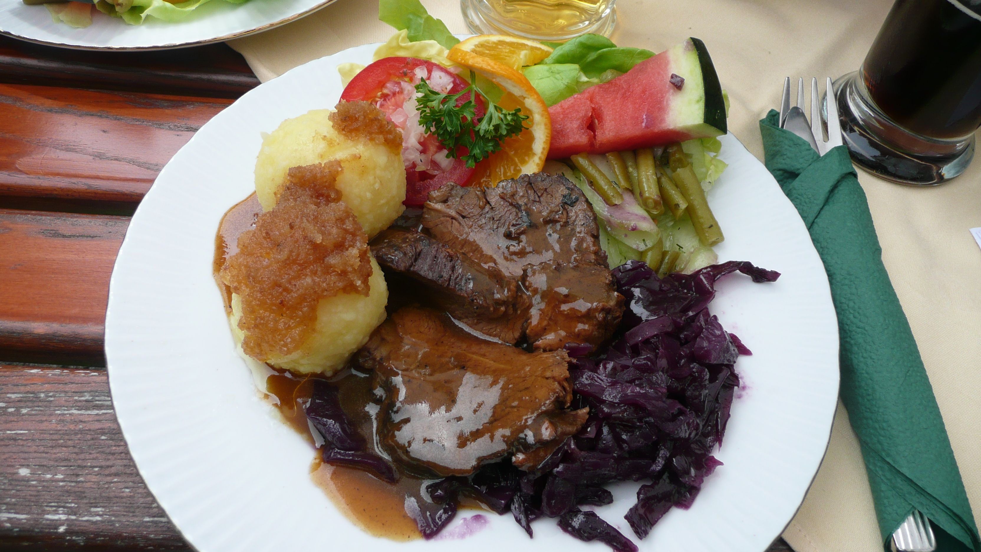 Sächsischer Sauerbraten mit Kartoffelklößen und Rotkohl, im Restaurant Marienmühle im Seifersdorfer Tal, Sachsen